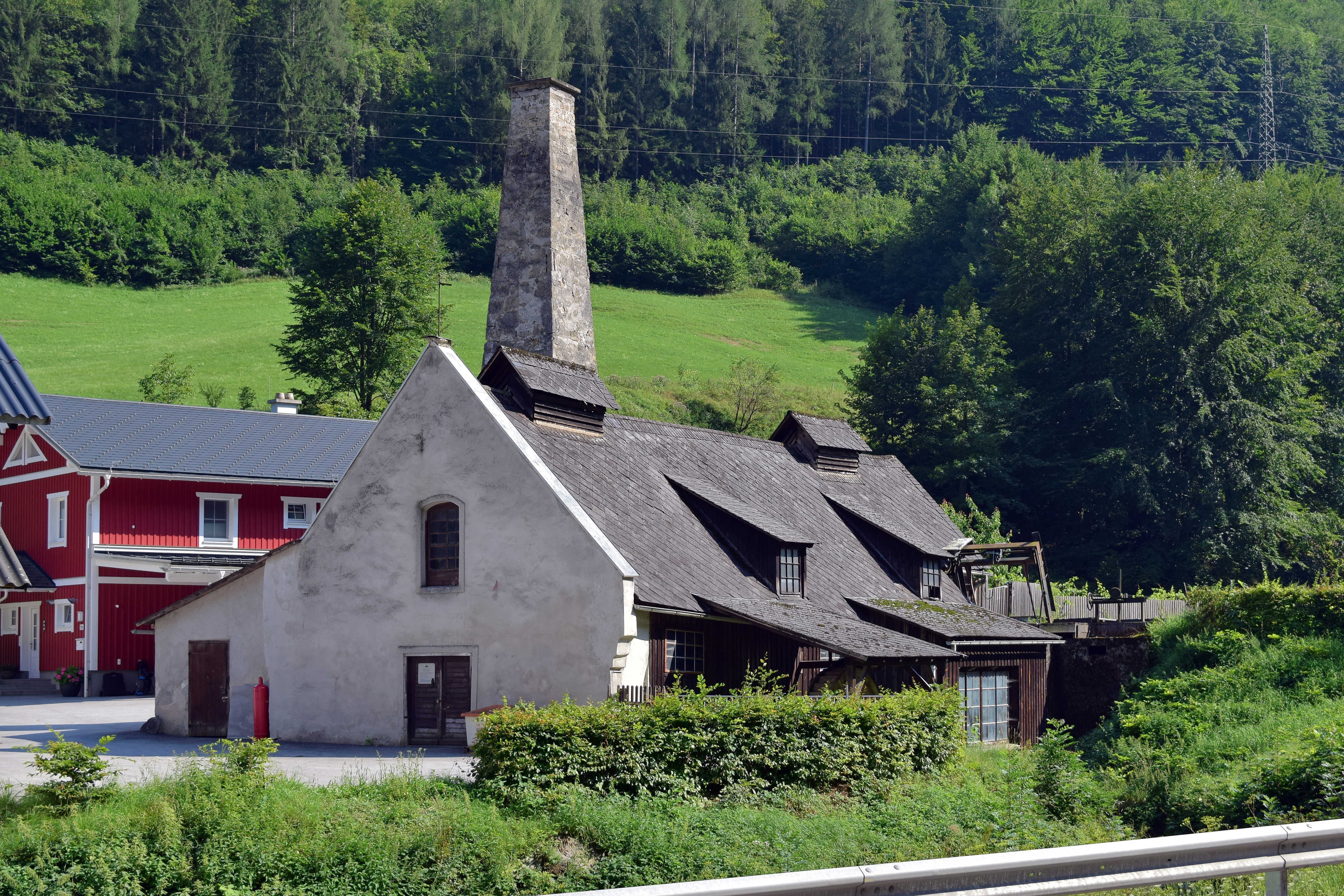 Werksgebäude des ehem. Hammerwerkes Hammer in der Öd/ Wasserhammerwerk d. Schraubstockfabrik Leander Grabner